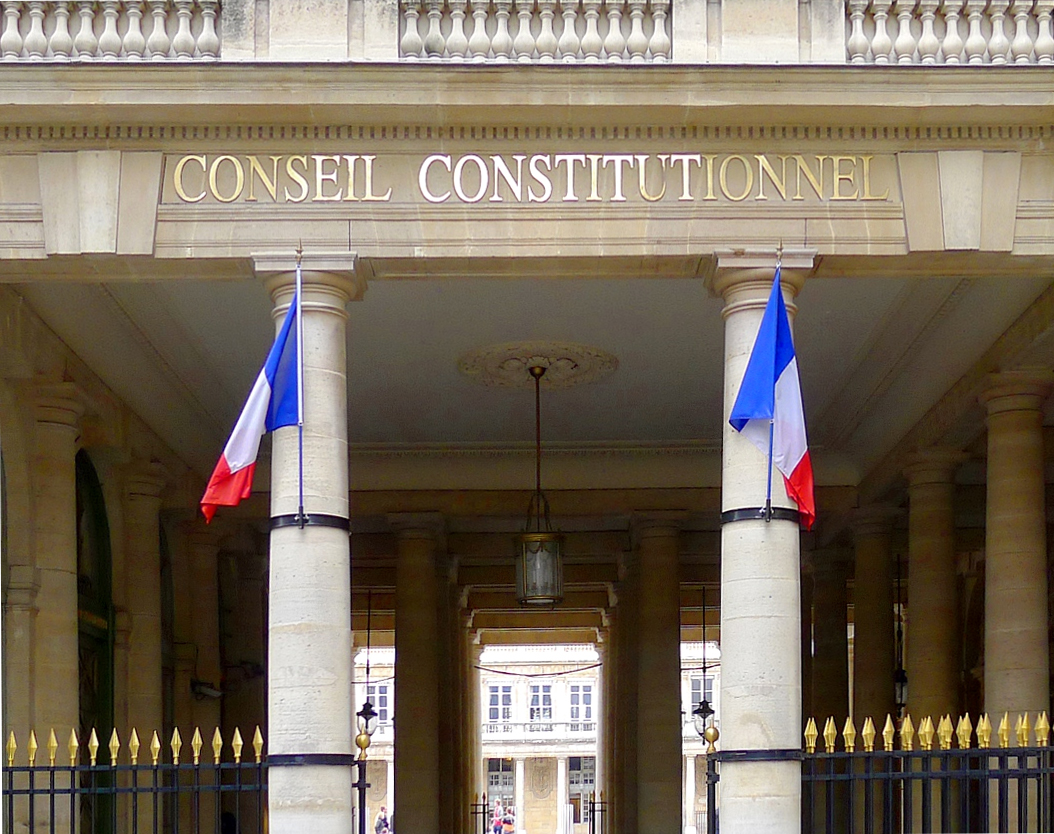 Rue de Montpensier (entrée du Conseil constitutionnel) - Paris Ier